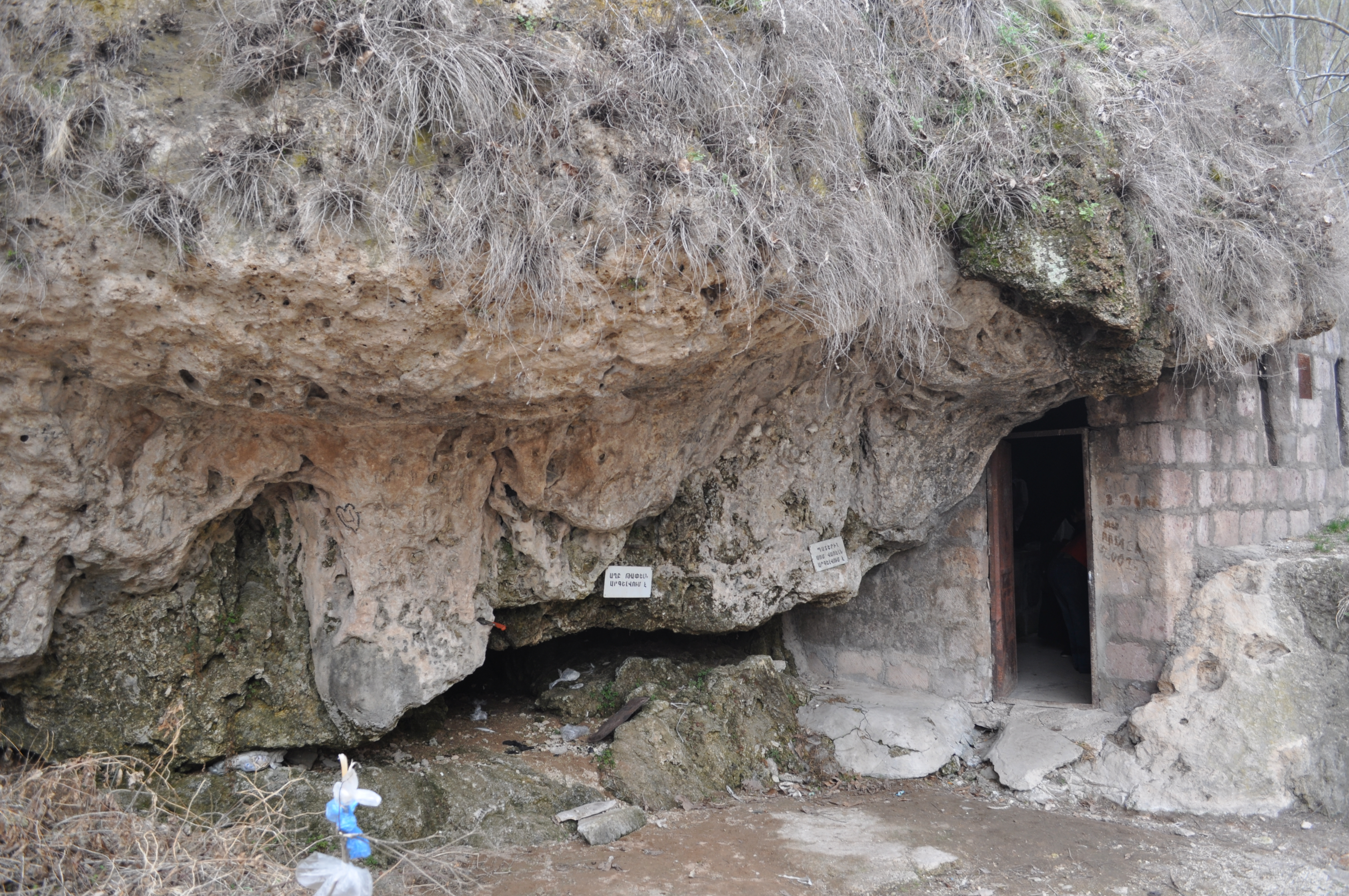 Ջրովանքը ջաերկրաբանական հուշարձան է: Գտնվում է Արփի գյուղից 3 կմ հվ-արլ, Արփա գետի ձախ վտակ Ջրովանք գետակի ակունքում, ծ.մ-ից 1345 մ բարձրության վրա